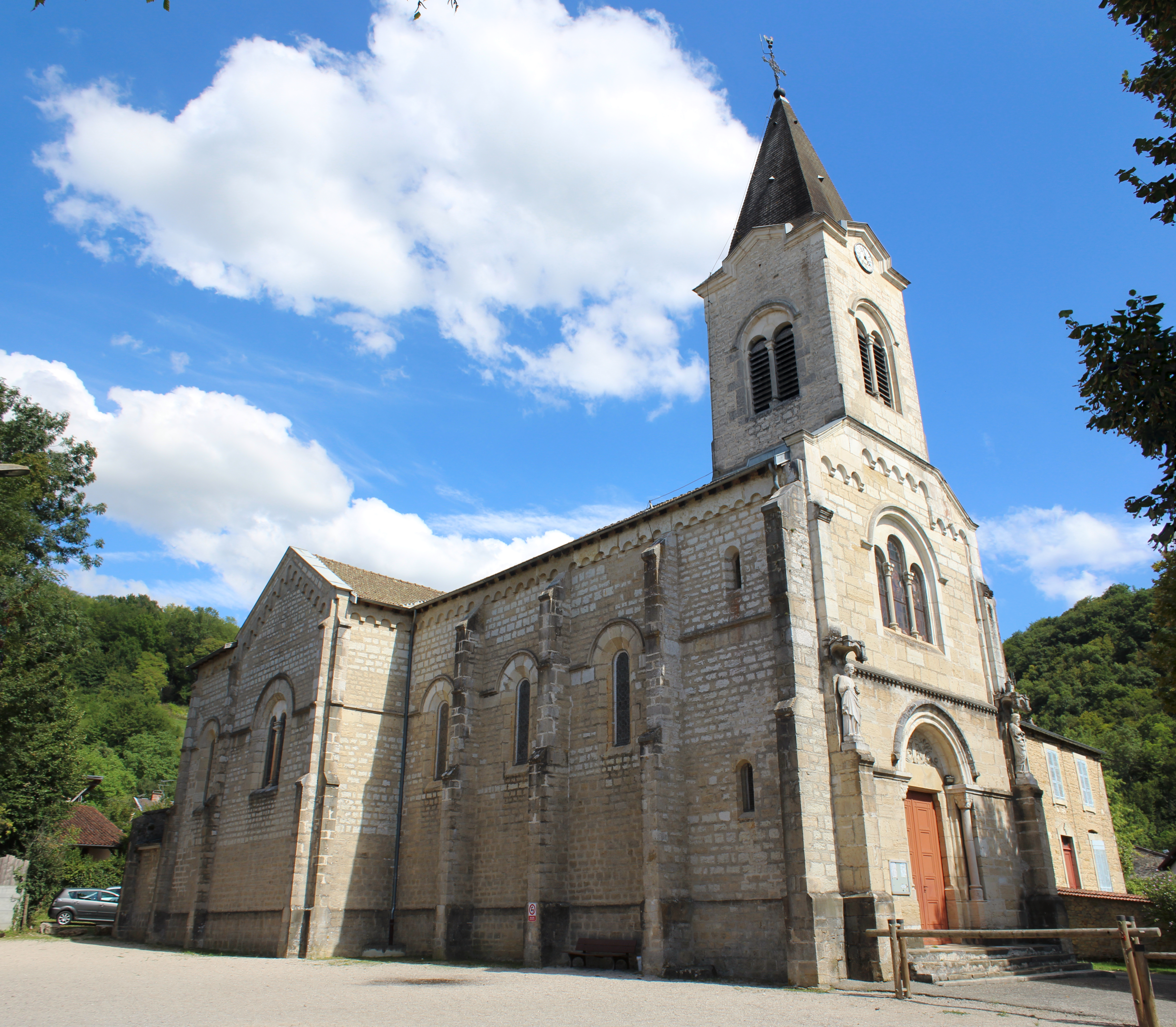 Église Saint-Pierre-et-Saint-Paul de Douvres, Ain.